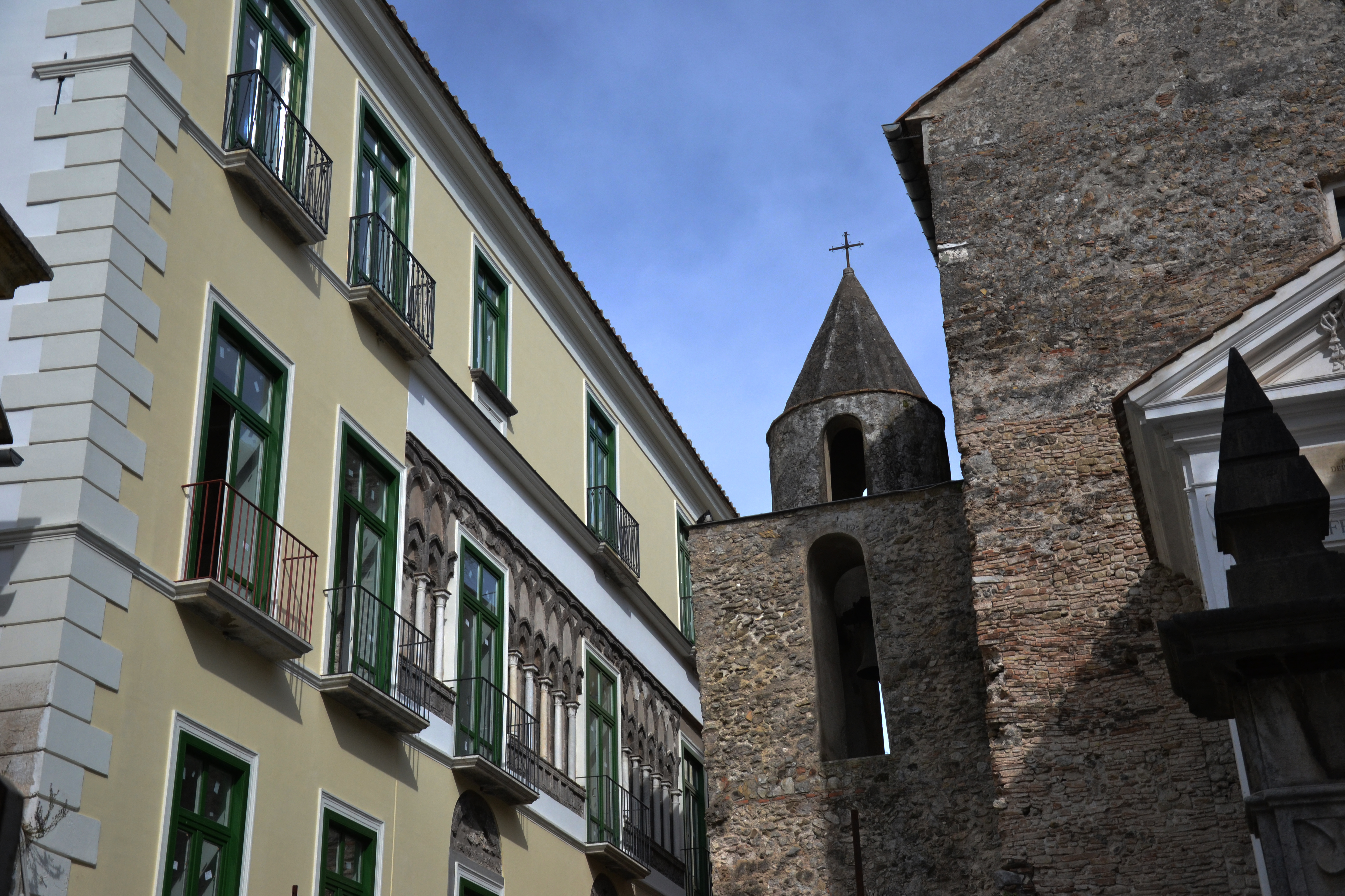 Vista di Palazzo Fruscione